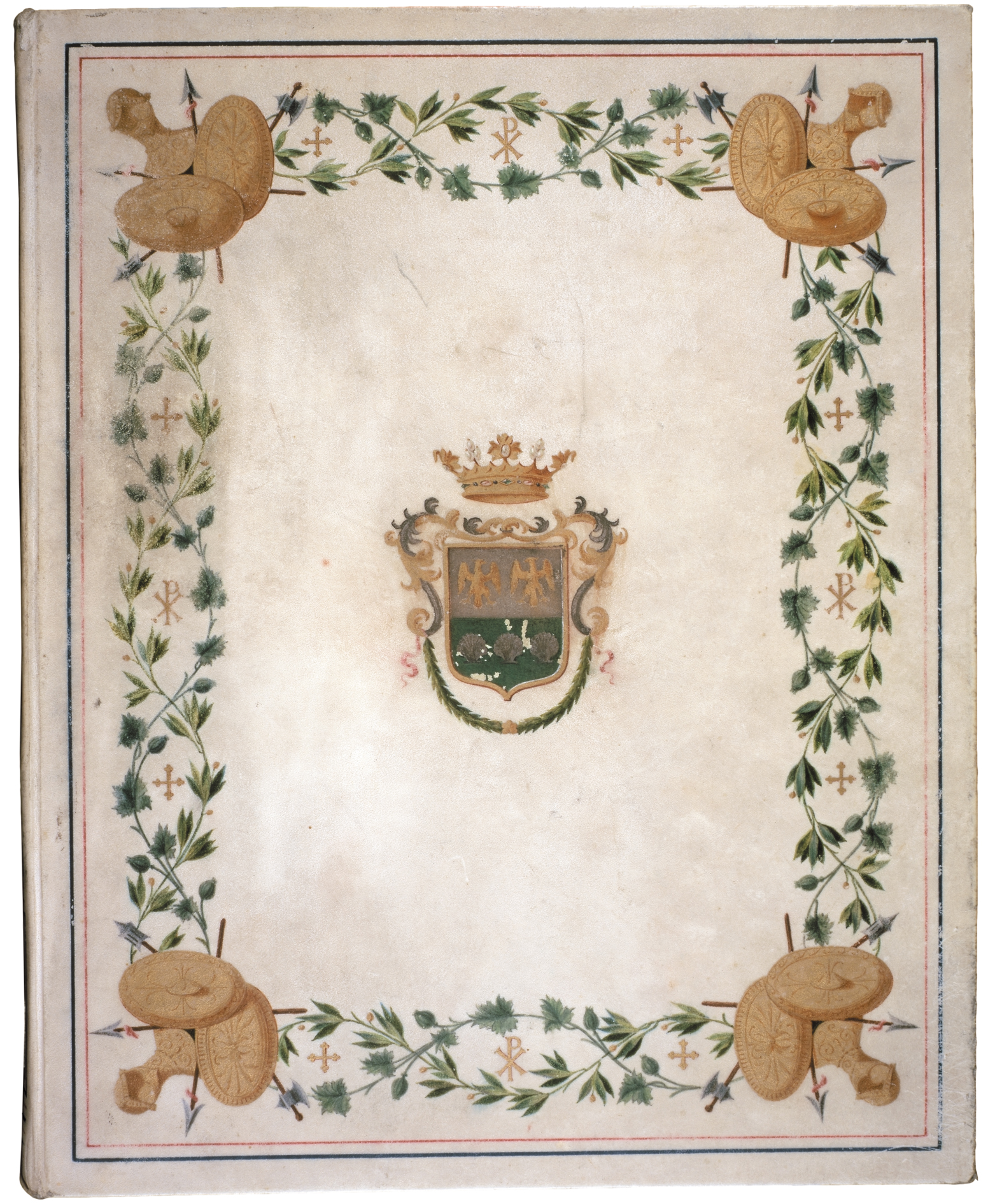 Epistolario de Miguel Miramón y Concepción Lombardo